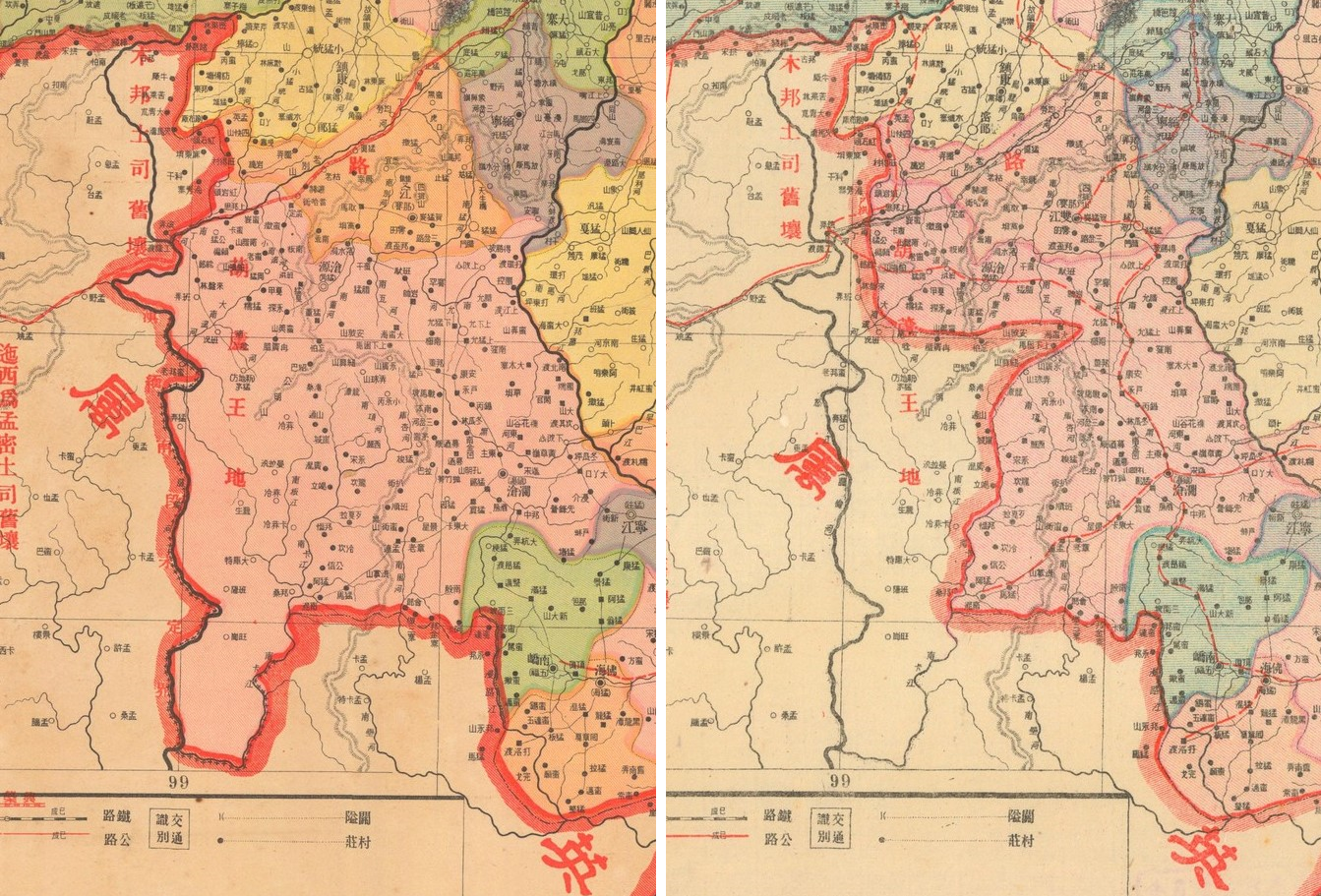 一九四一年线签订前后的葫芦王地地图边界比较